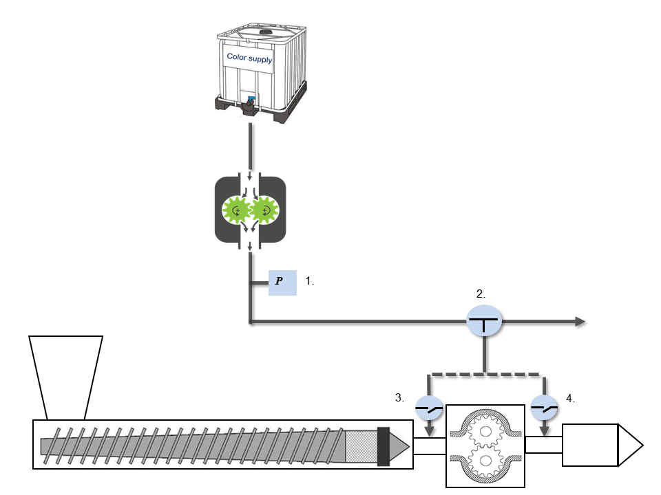 Prinzip der Dosierung von Flüssigfarbe in die Schmelze